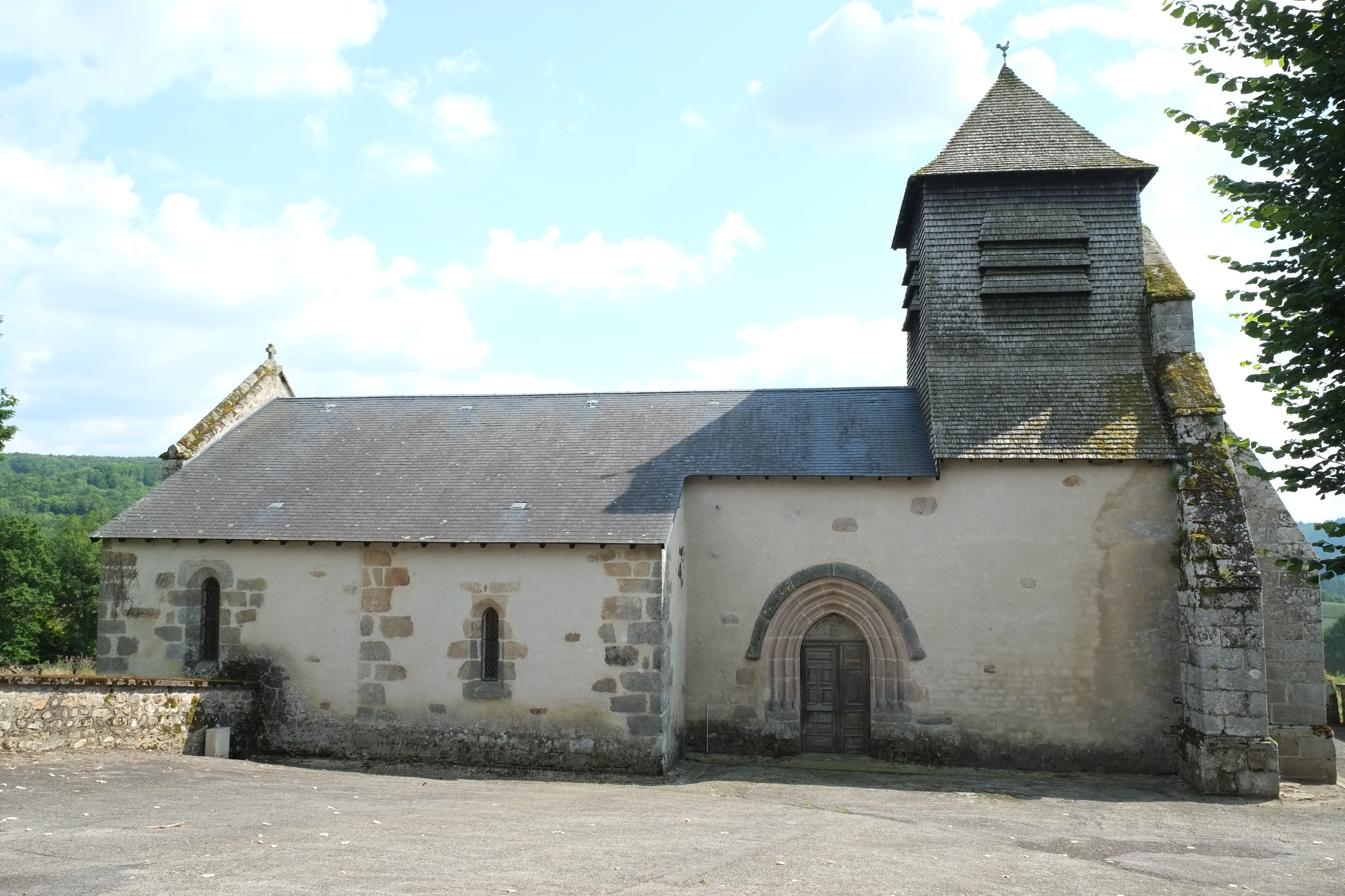 Kirche Saint Julien de Brioude in Saint-Julien-le-Petit im Département Haute-Vienne der Region Lomousin (Frankreich)